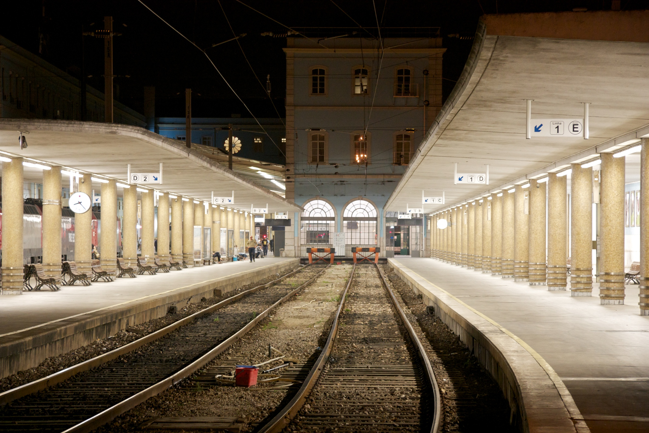 Tipo: E [ Estação ] Local: Lisboa [Linha do Norte , PK 0,0] Data e hora: 13 de Outubro de 2011 [20h23]